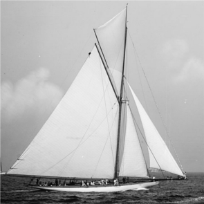 Columbia Yacht 1899 - Nathanael green Herreshoff - Vignette Carrée